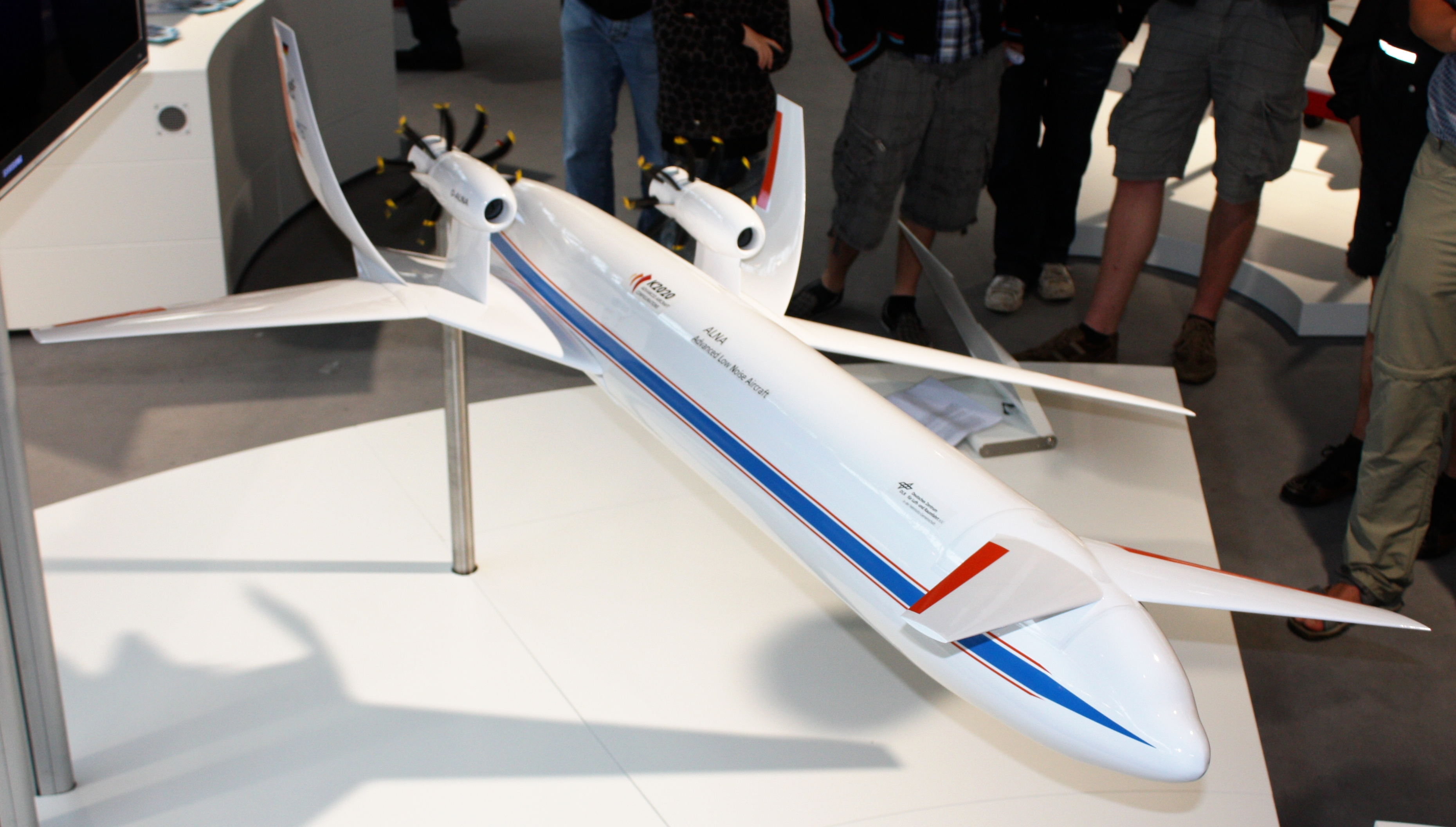 ILA 2010, am Samstag aufgenommen, meist erhöht von einer Leiter fotografiert